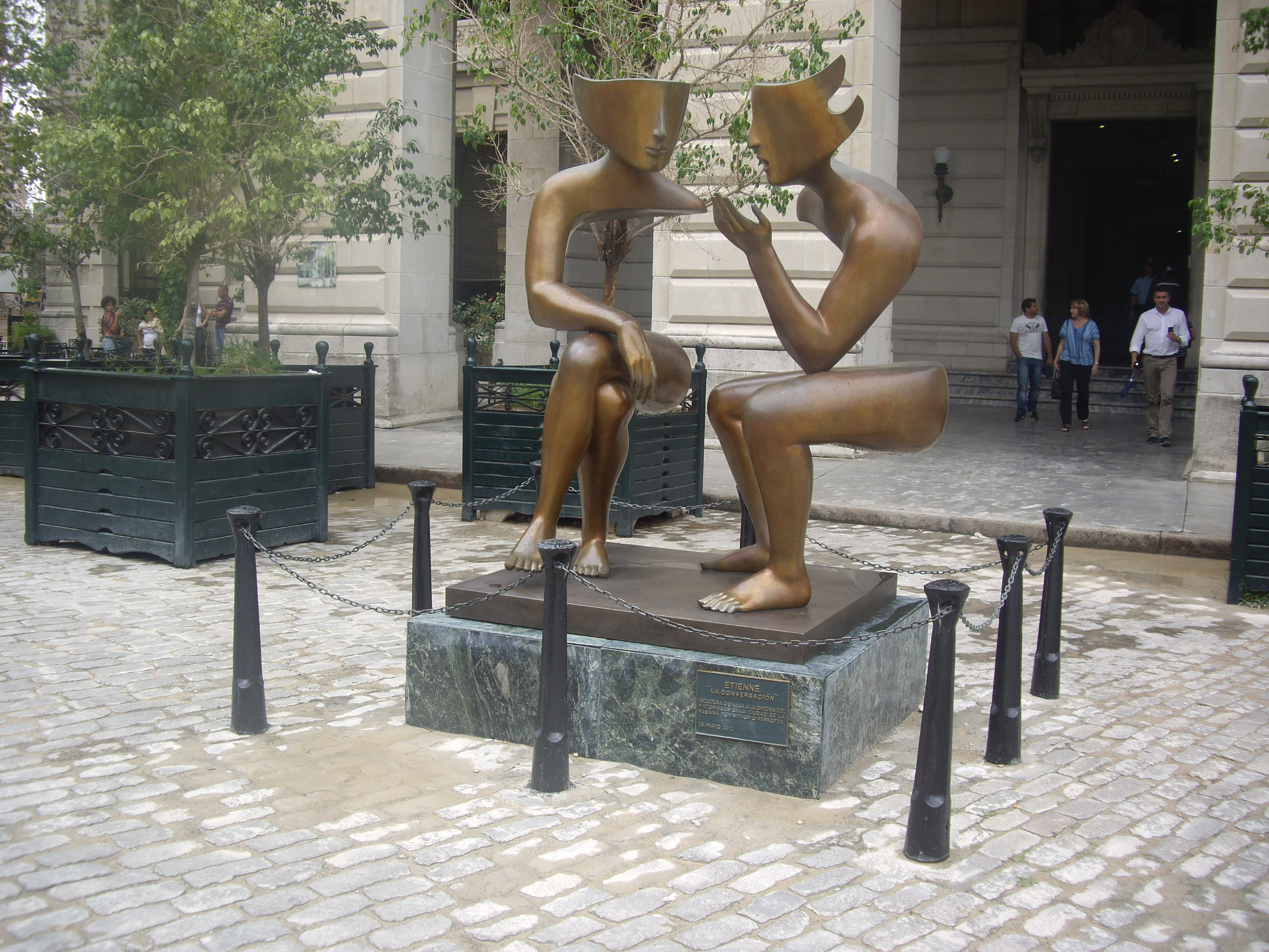 Escultura "La Conversació" a la plaça de Sant Francesc d'Assís (l'Havana)